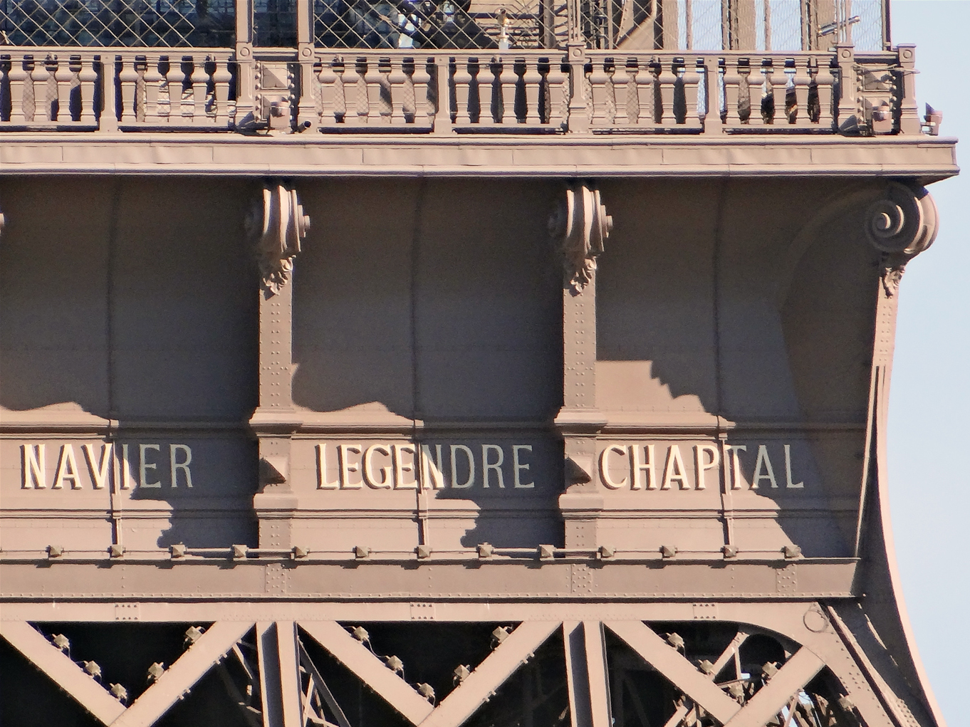 Trois noms de savants sur la face Trocadéro de la tour Eiffel (1er étage) Sur la tour Eiffel, Gustave Eiffel a fait graver soixante-douze noms de scientifiques, ingénieurs ou industriels qui ont honoré la France de 1789 à 1889. Ces noms s'étalent en lettres d'or en relief de 60 cm de haut sur la périphérie du premier étage. Ils furent recouverts de peinture au début du XXe siècle avant d'être restaurés entre 1986 et 1987 par la Société nouvelle d'exploitation de la tour Eiffel (SNTE). Extrait de l'article de Wikipedia sur les noms des savants